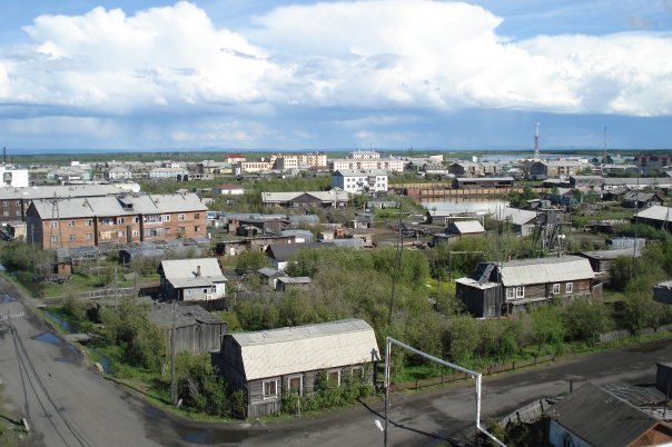 Зырянка